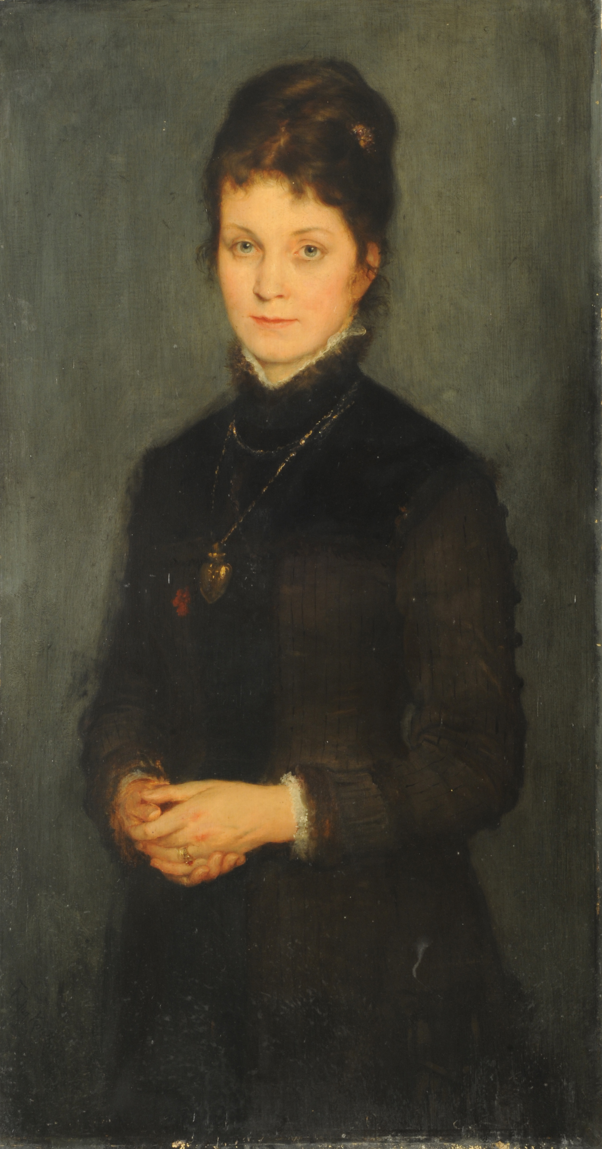 Friedrich August von Kaulbach, Retrato de señora. Siglo XIX. 99,8 x 52,6 cm, con marco: 117,6 x 71,3 cm, óleo sobre tabla. Inv. 2183.